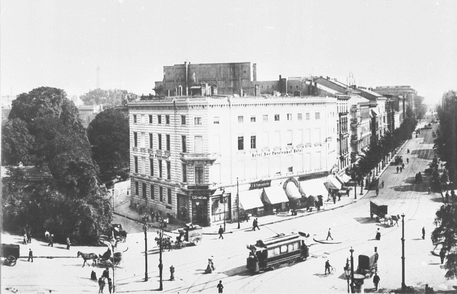 Ansicht des Berliner Hotels "Fürstenhof" (am Potsdamer Platz).